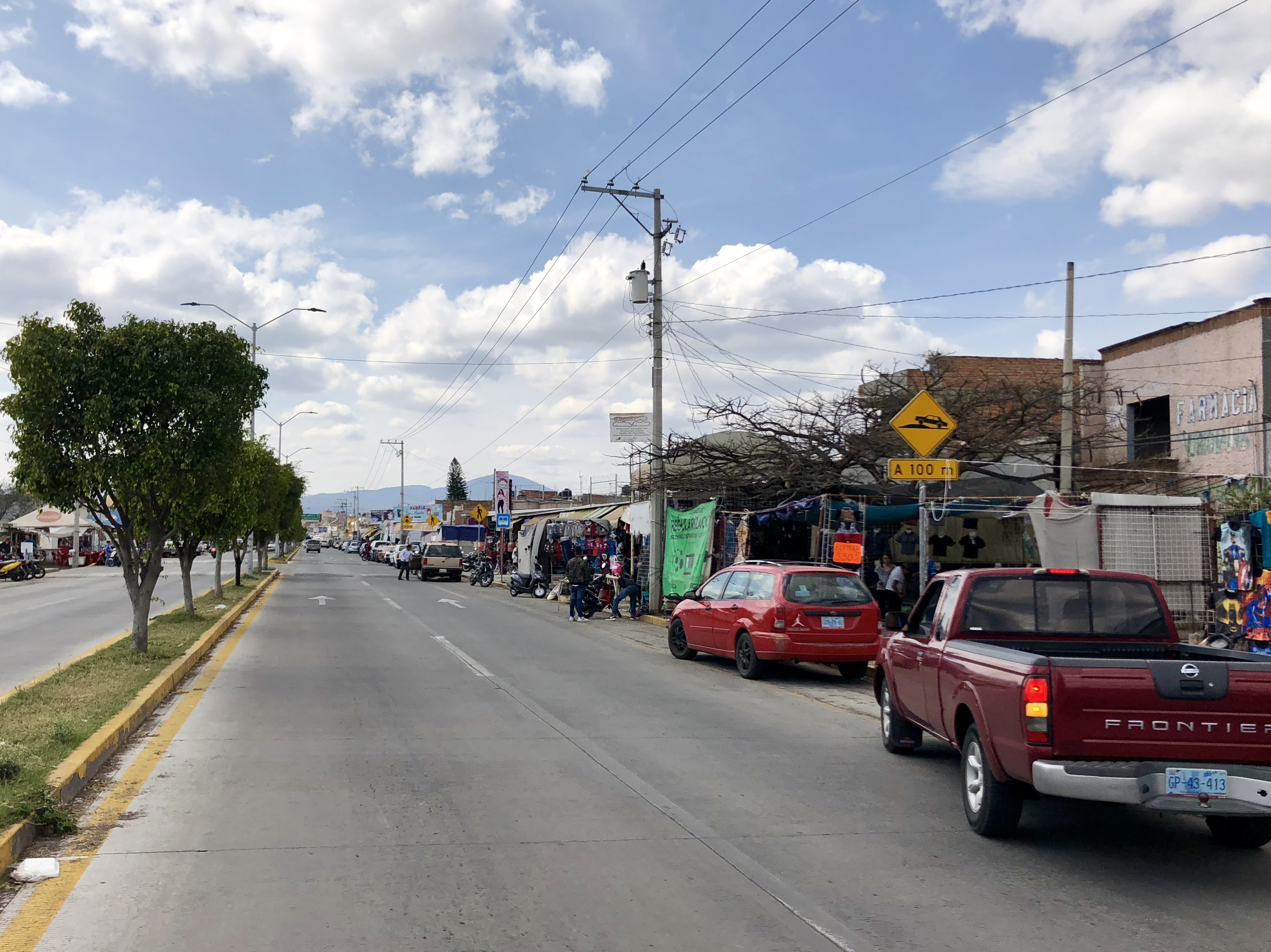 Zona Comercial Textil Uriangato Bulevar Leovino Zavala, imagen que muestra los puestos de ropa de Uriangato.